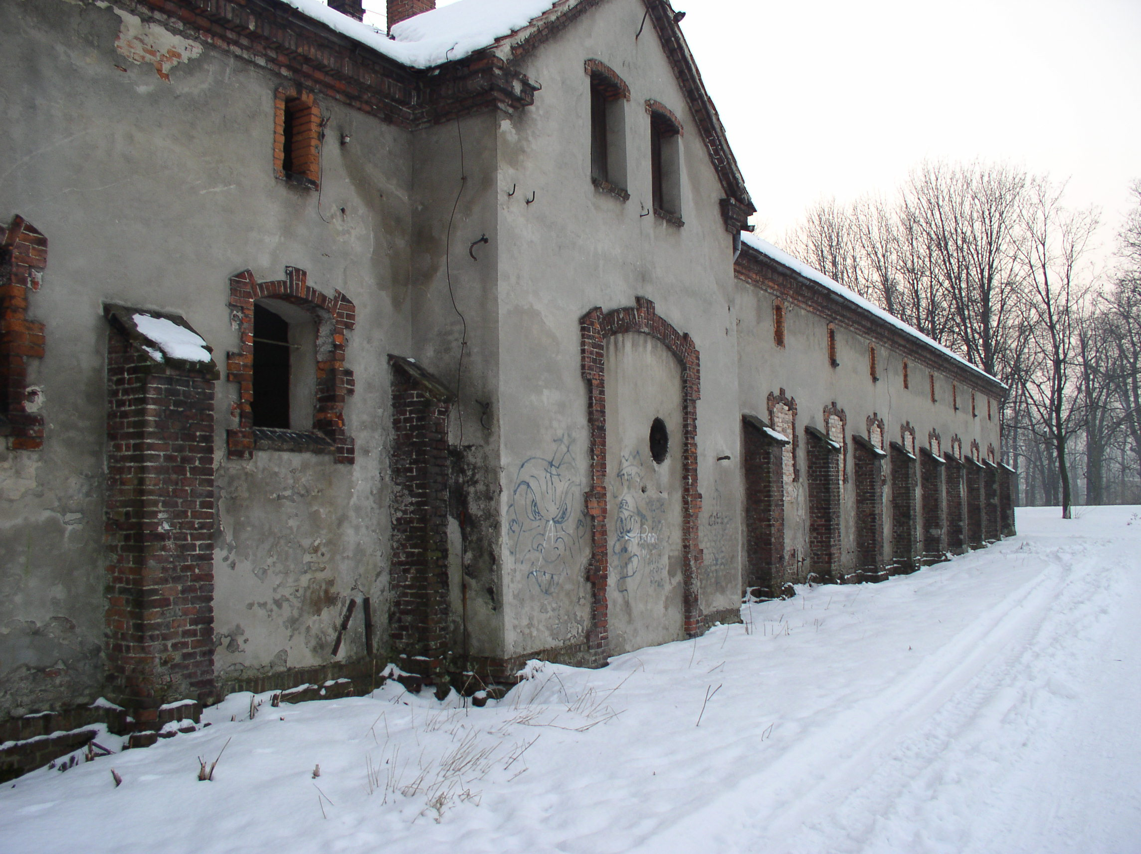 Racibórz - stajnie 6 Pułku Huzarów im. Hrabiego Goetzena (2 Śląskiego)